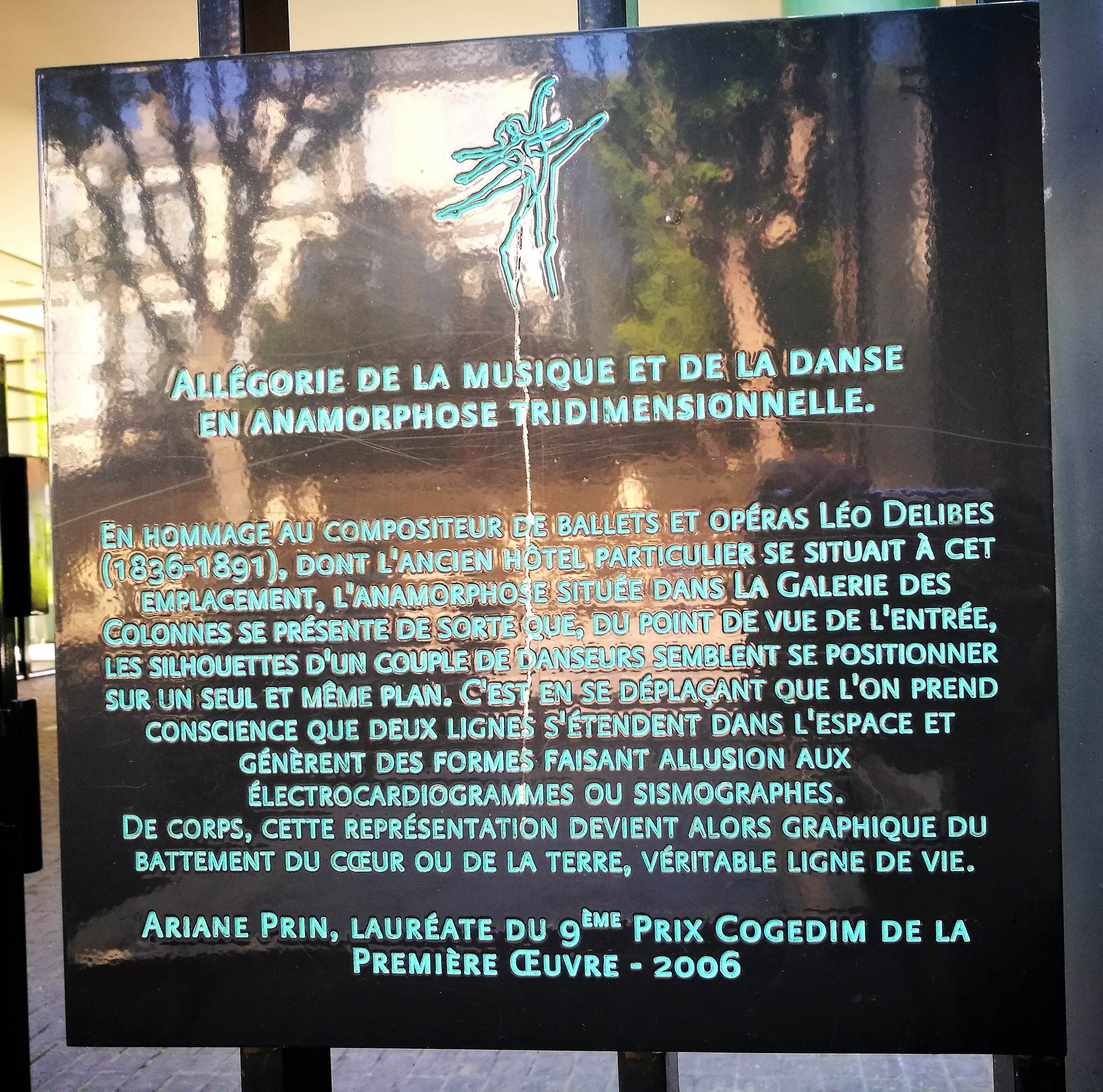 Plaque en mémoire du Compositeur Léo Delibes - Face parc Roger Salengro.